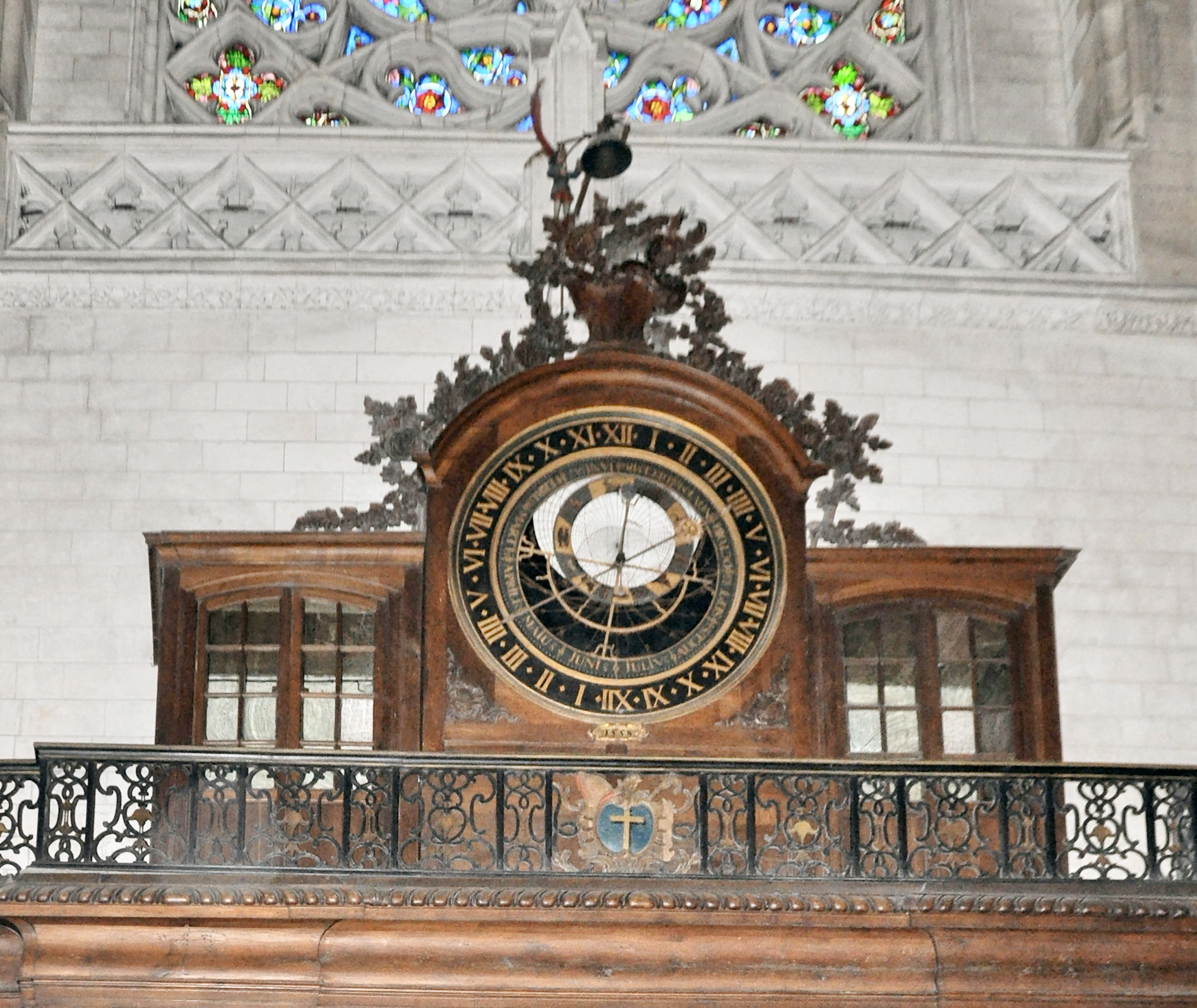 Détail de l'horloge astronomique.